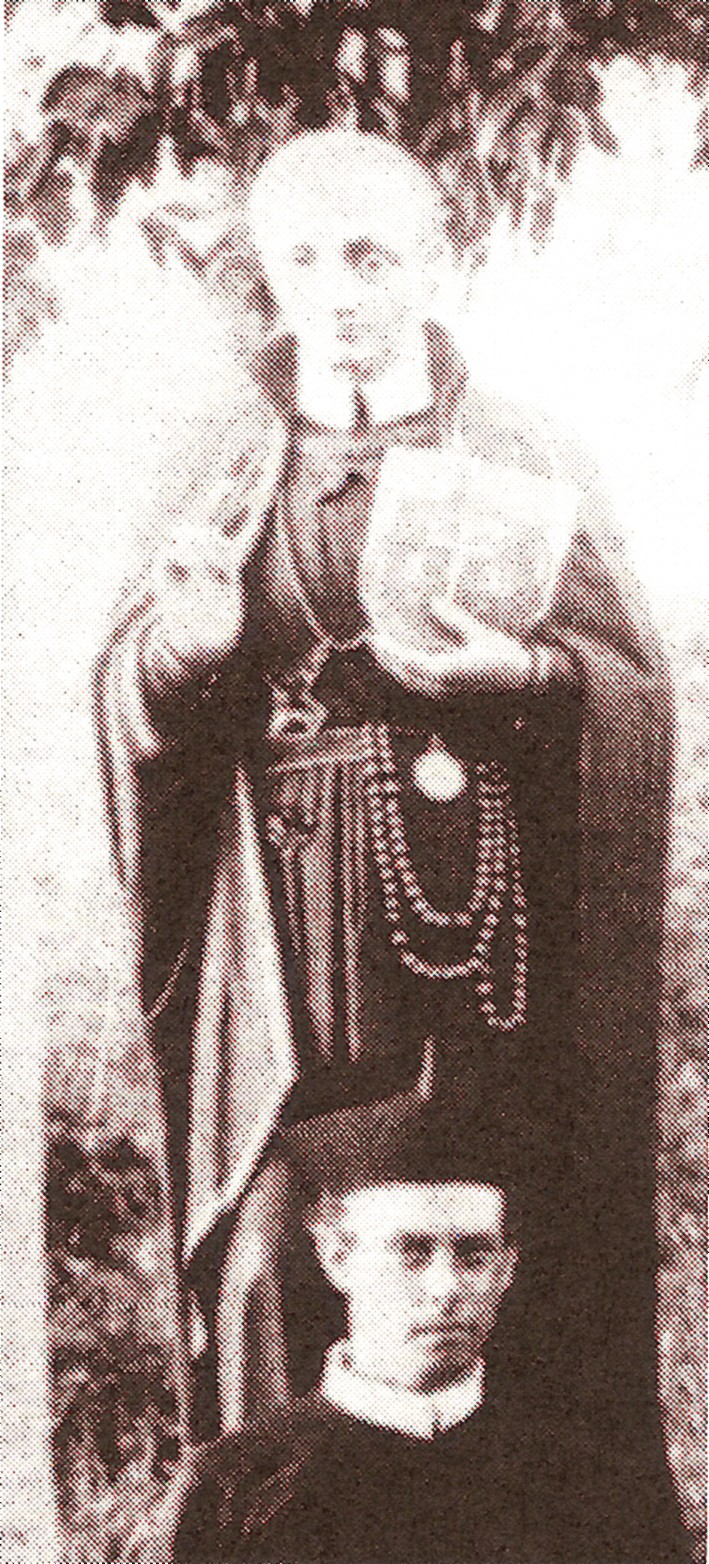 De Surinaamse pater Henri Francois Rikken voor een beeld van de H. Alfonsus. Eigen scan van een foto van circa 1900.